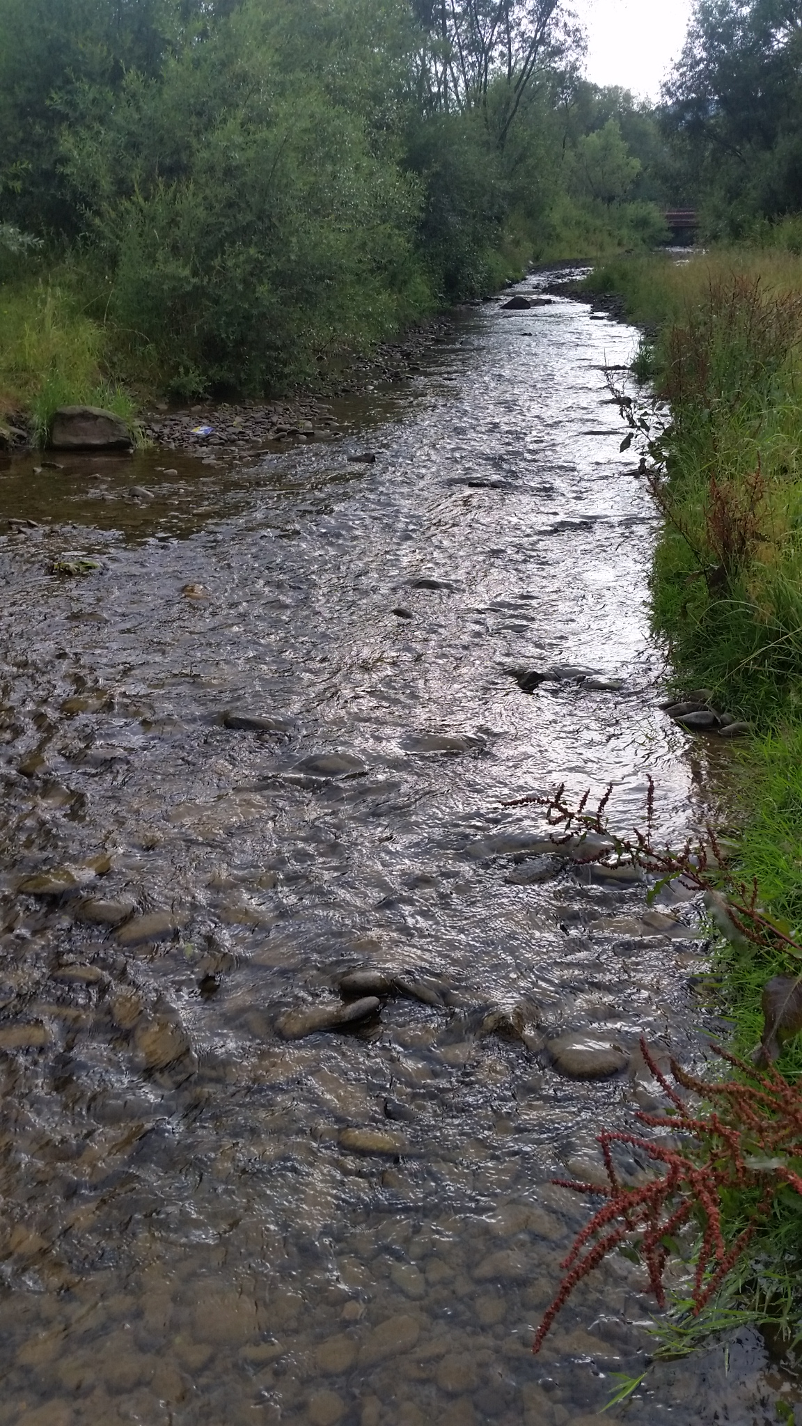 Kolačkovský potok v obci Nová Ľubovňa, tesne pred svojim ústím